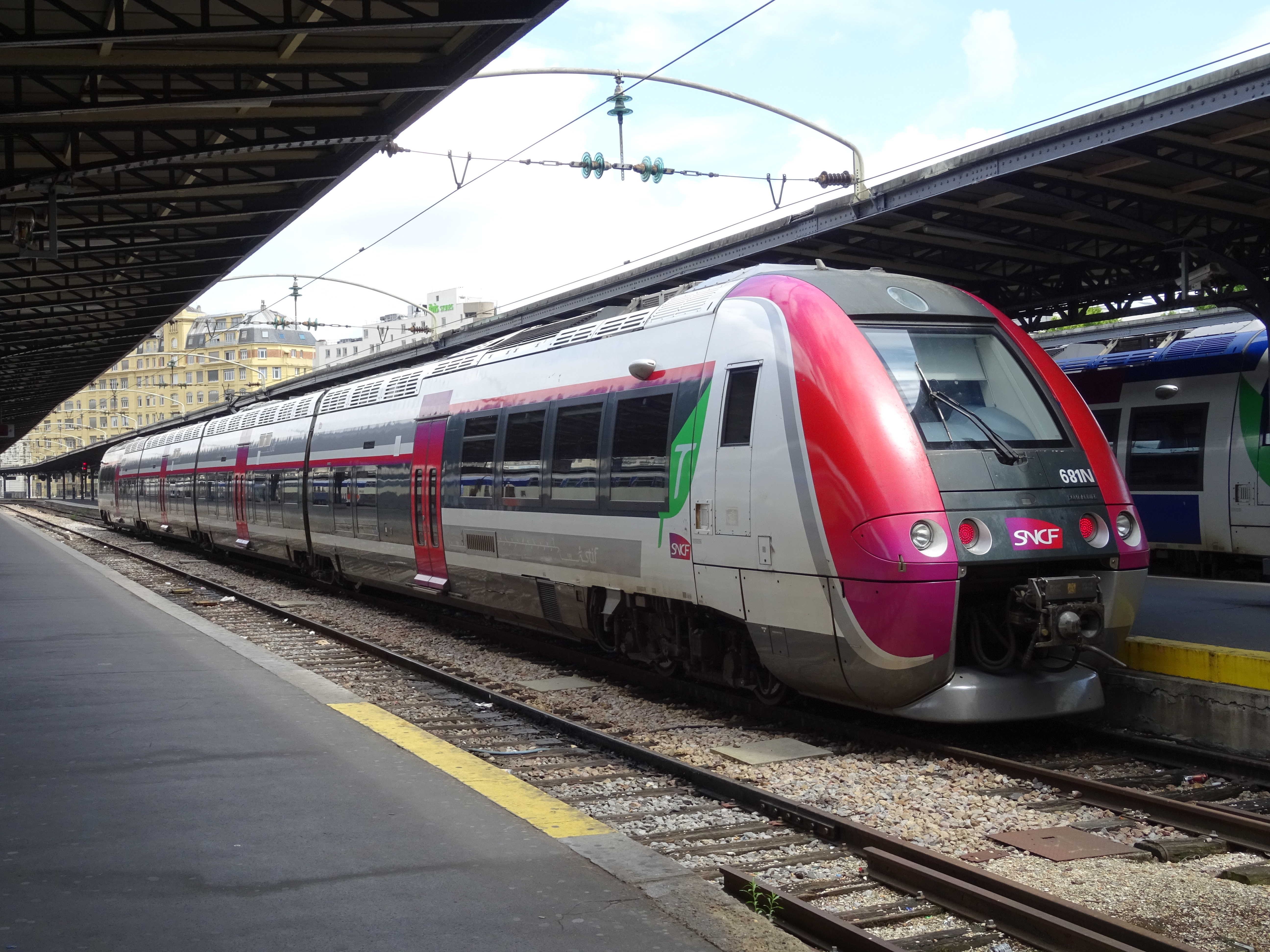 AGC Transilien P à quai de Paris-Est